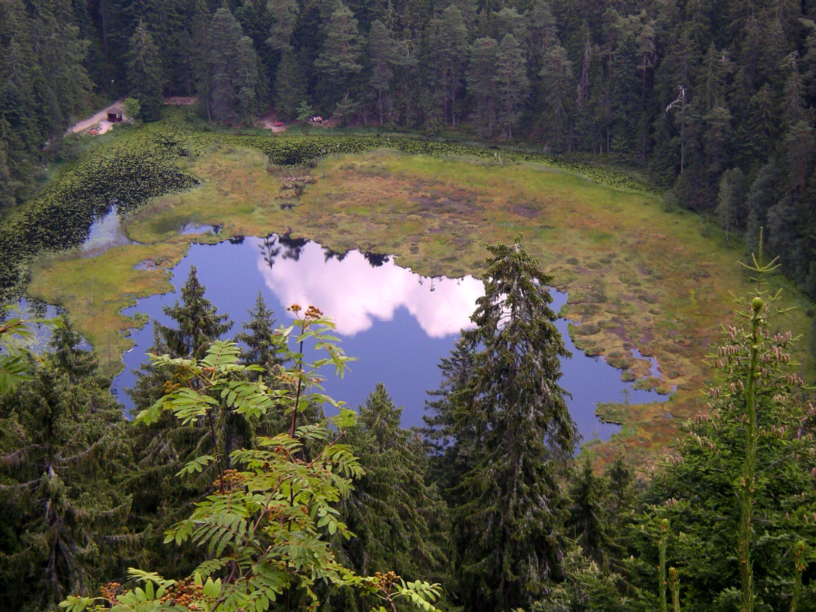 Huzenbacher See im Nordschwarzwald, Deutschland. Seeblick von der Karwand.